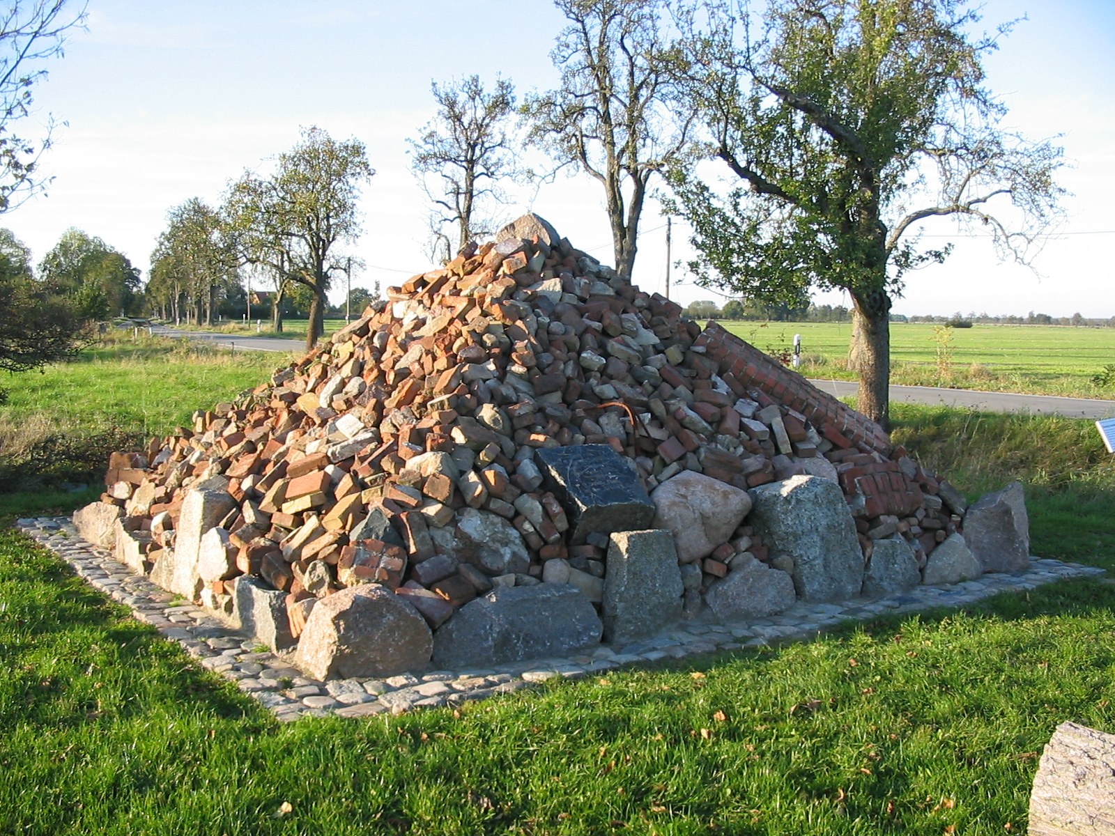 Zu einer Denkpyramide angehäufte Mauerreste eines abgetragenen Dorfteils von Vockfey im Amt Neuhaus an der ehemaligen innerdeutschen Grenze. Diese Reste der ehemaligen Bebauung wurden 2004 bei Deichbauarbeiten an der Elbe gefunden.